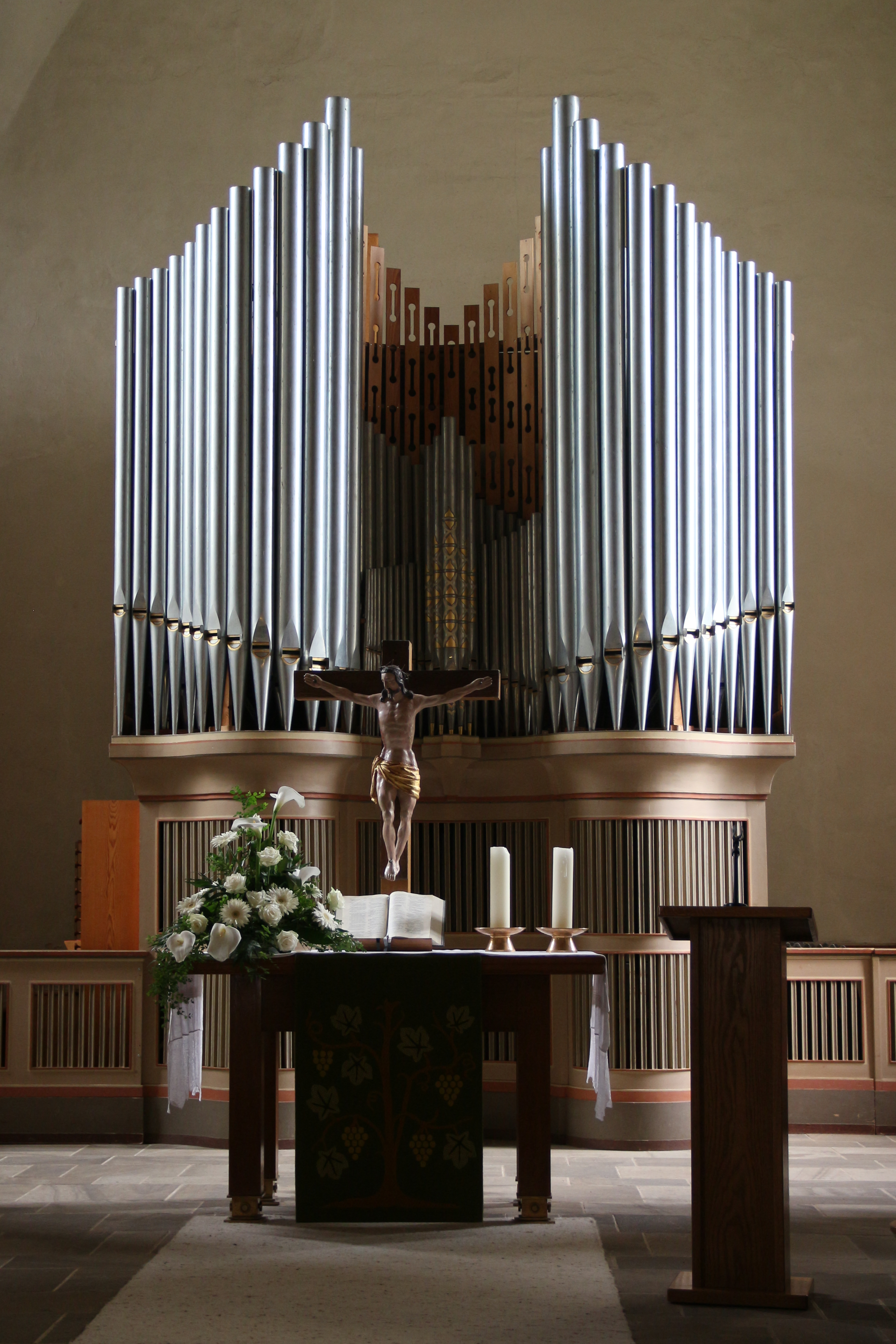 Martinskirche (Dautphe)